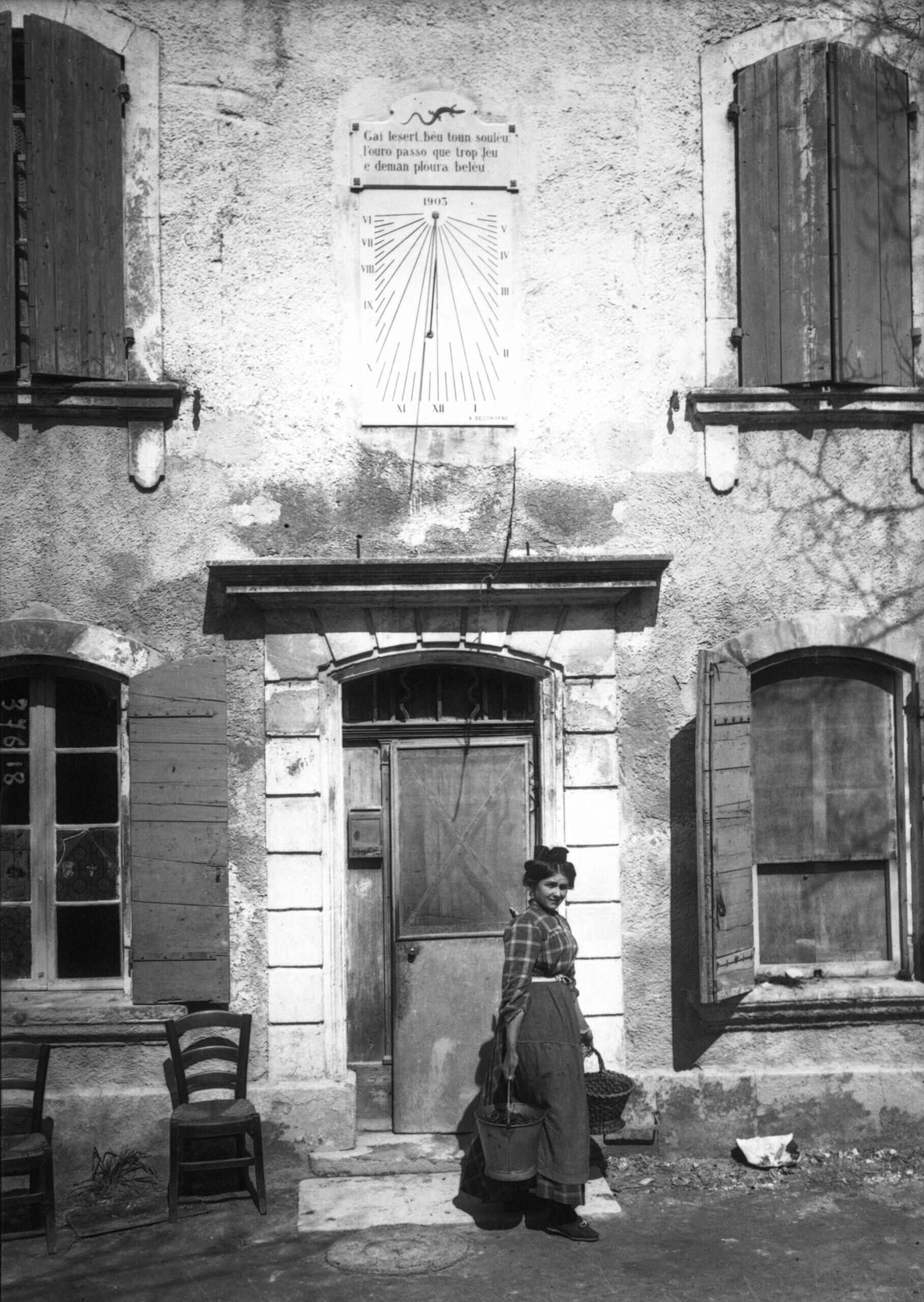 Porte d'entrée de la « maison au cadran » à Maillane où Frédéric Mistral (1860-1914) composa Mirèio (Mireille)